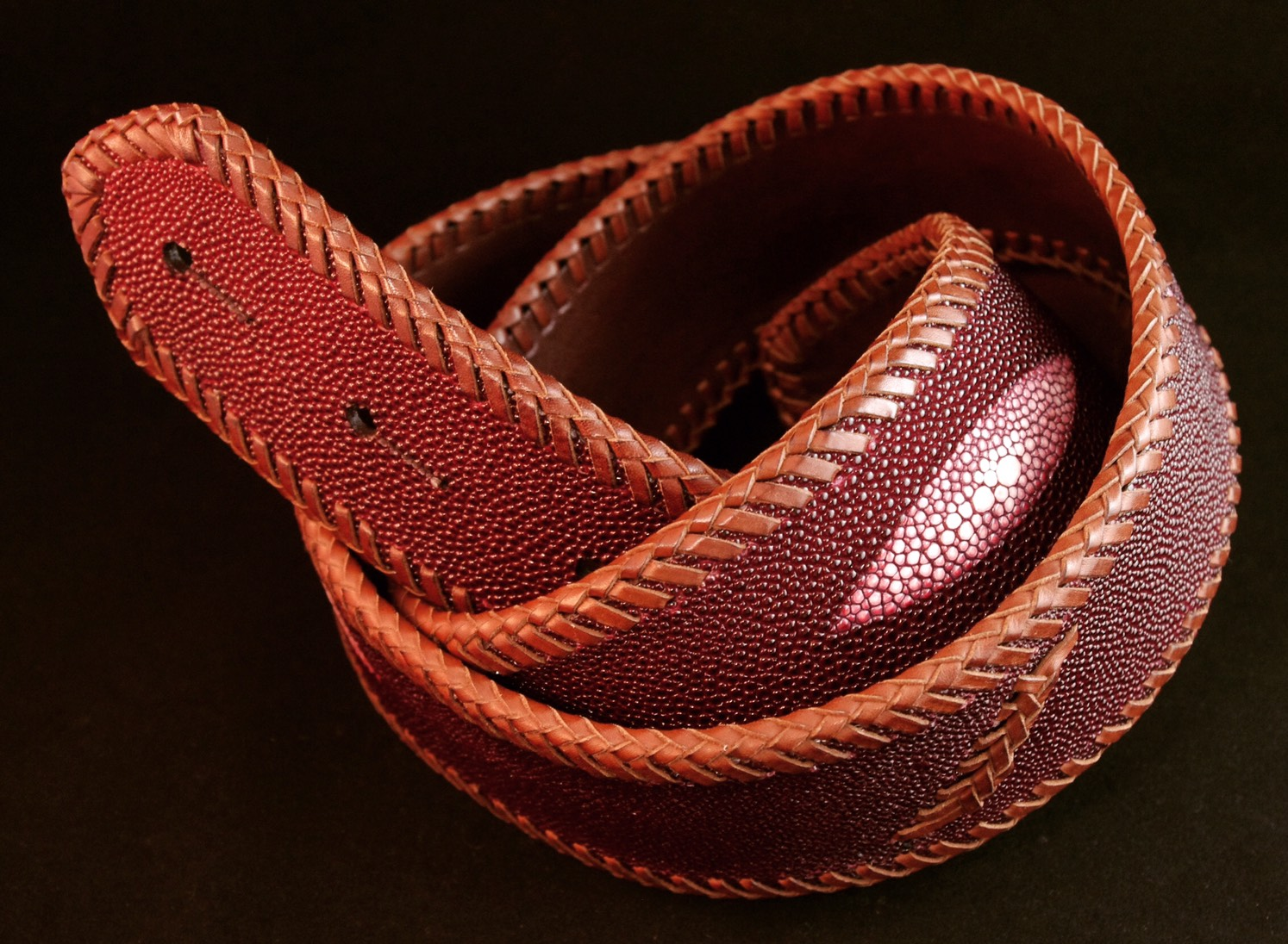 エイ革とカンガルー革を編み込んだ、ギターストラップ